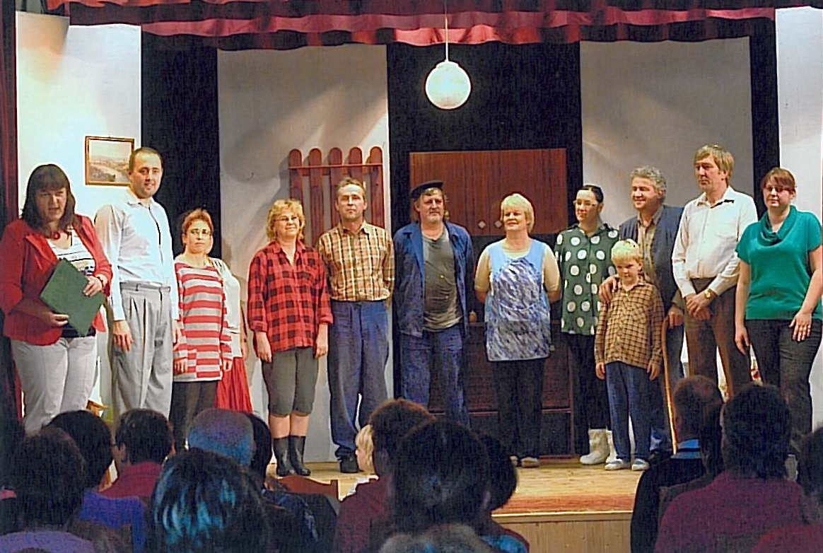 Przedstawienie